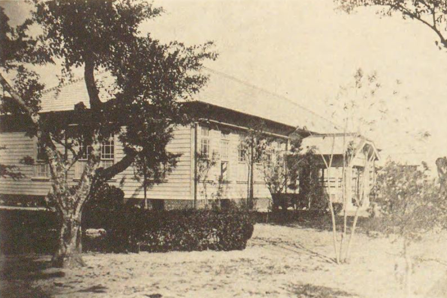 日治時期臺南的傳染病醫院